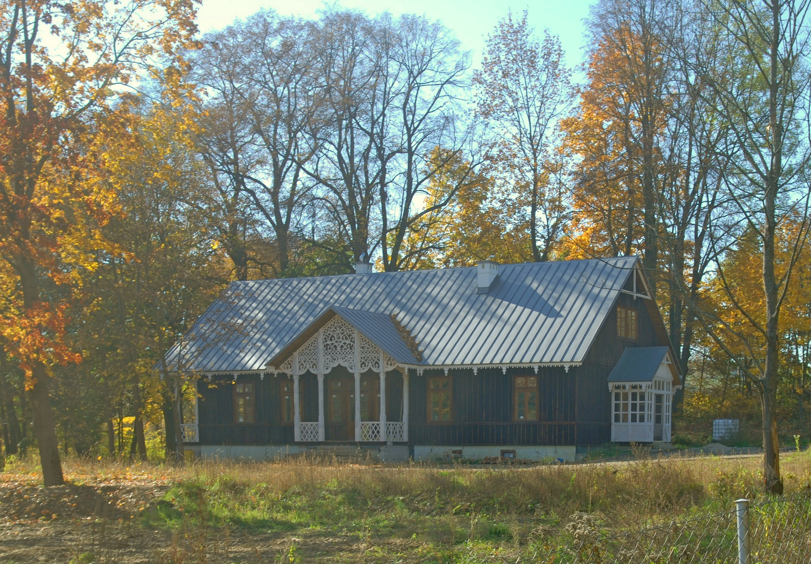 wieś Lipnica Dolna (województwo podkarpackie)